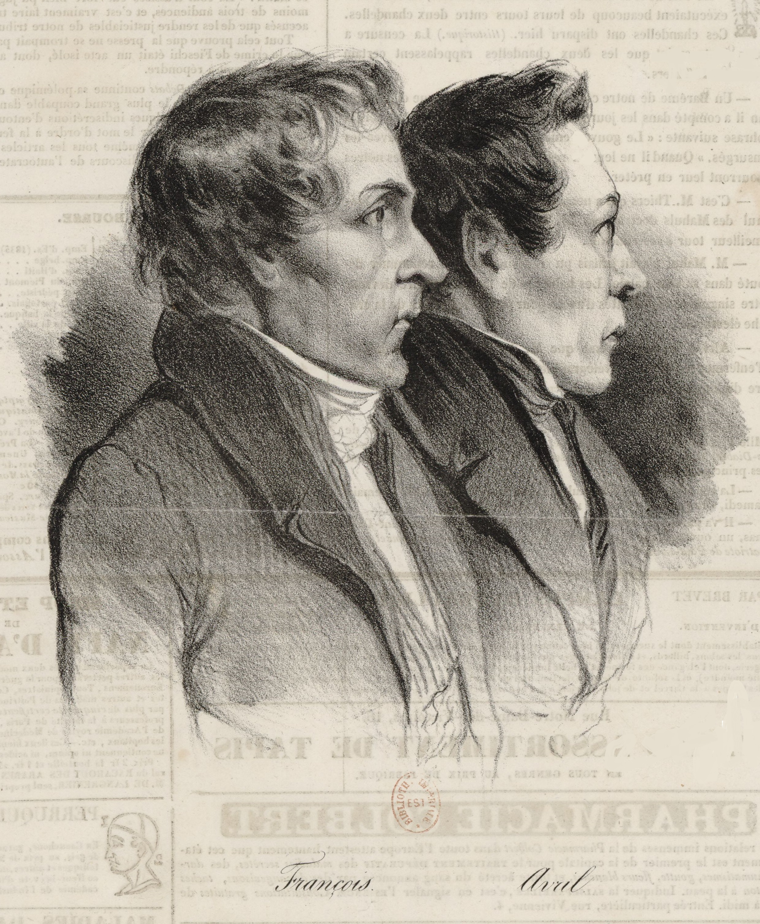 François et Avril, complices de Lacenaire. Lithographie de Pierre Théophile Junca, 1835.